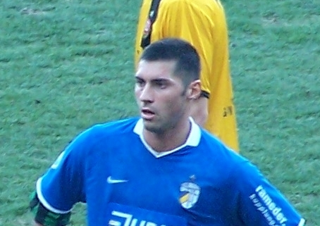 Salvatore Amirante von Carl Zeiss Jena (beim Spiel in Dresden, 31.3.2009)